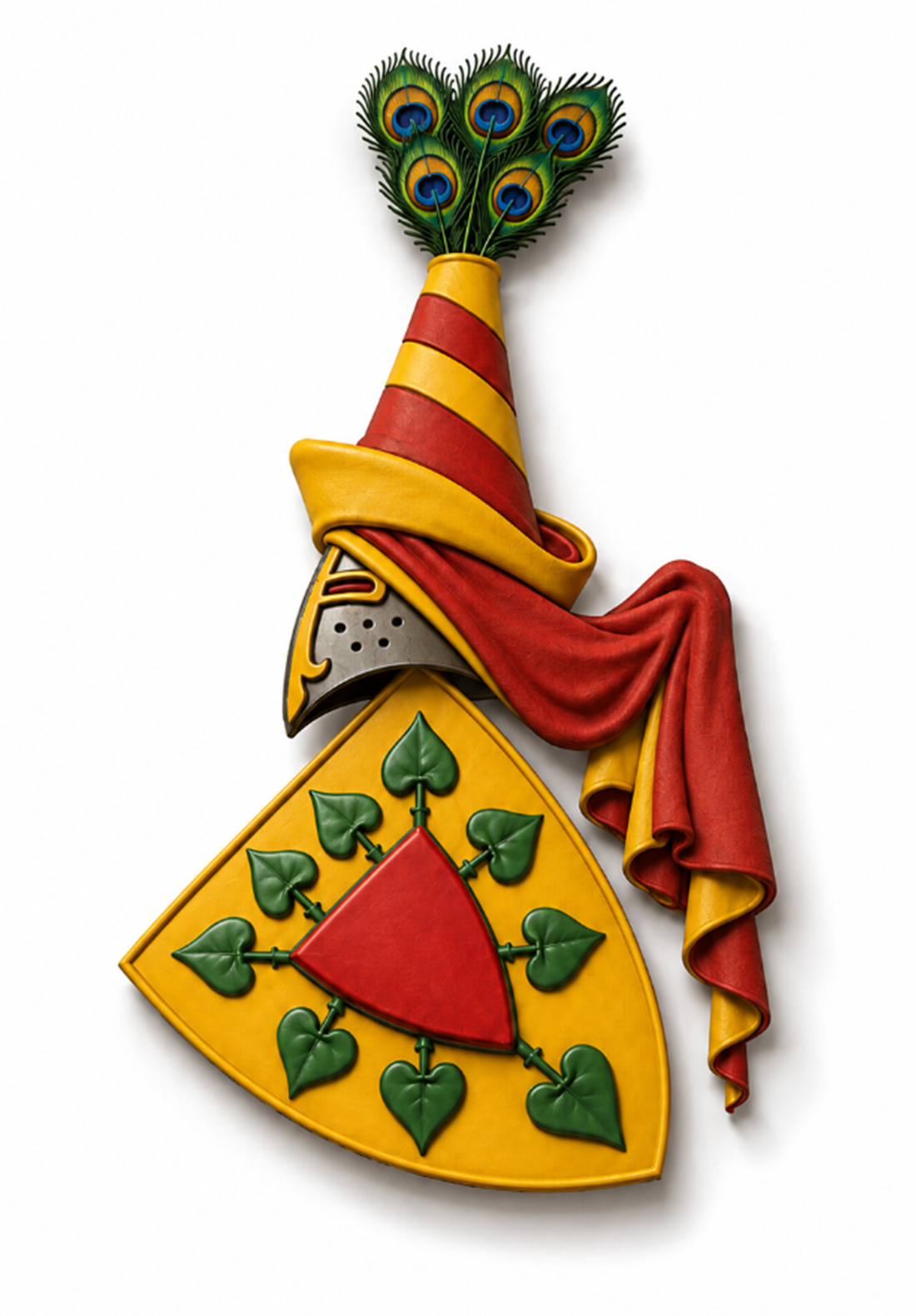 Stammwappen derer von Kniestedt, hildesheimischer Uradel